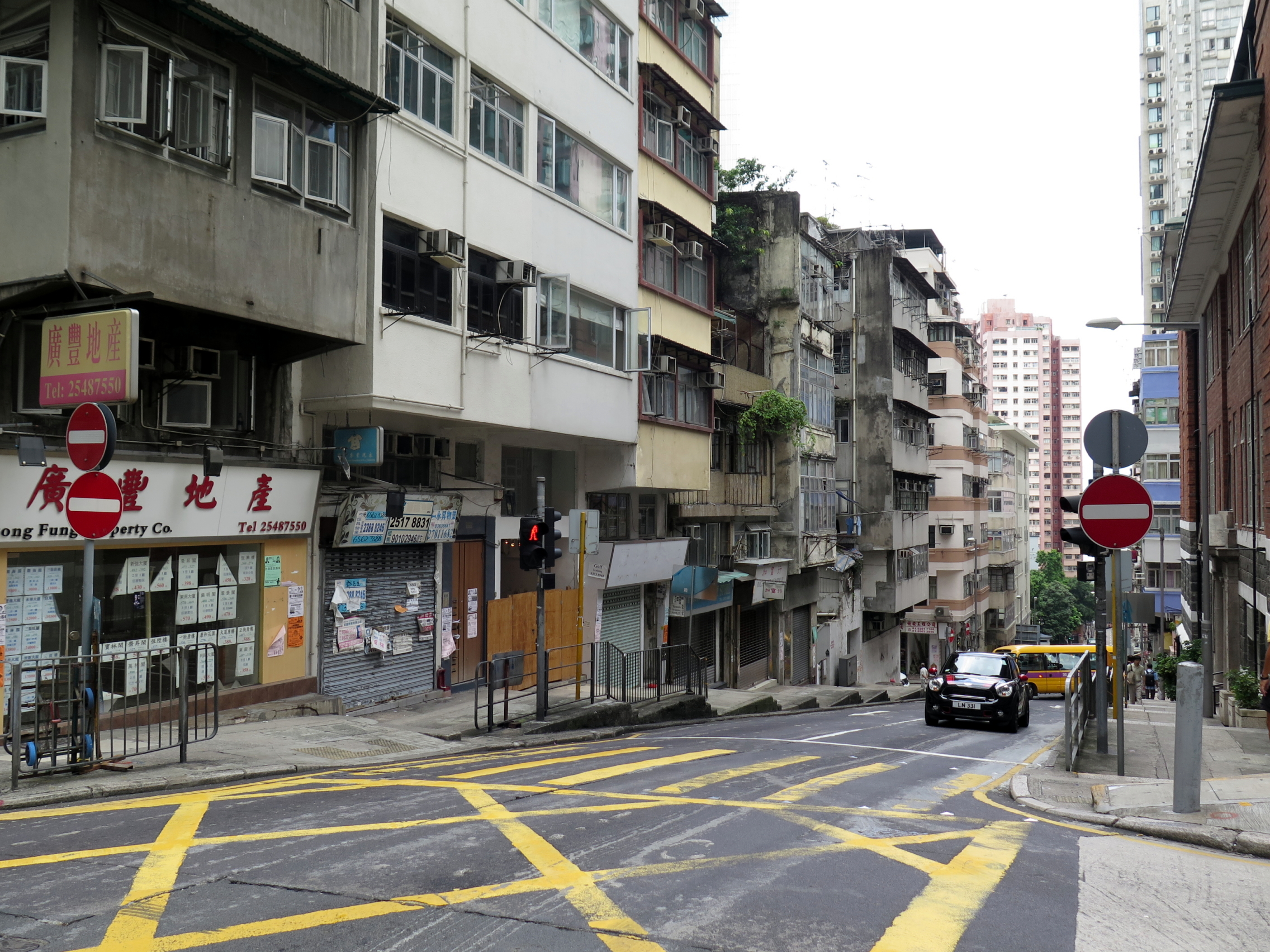 Western Street, Sai Ying Pun